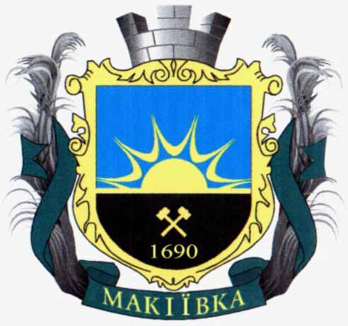 Герб города Макеевка